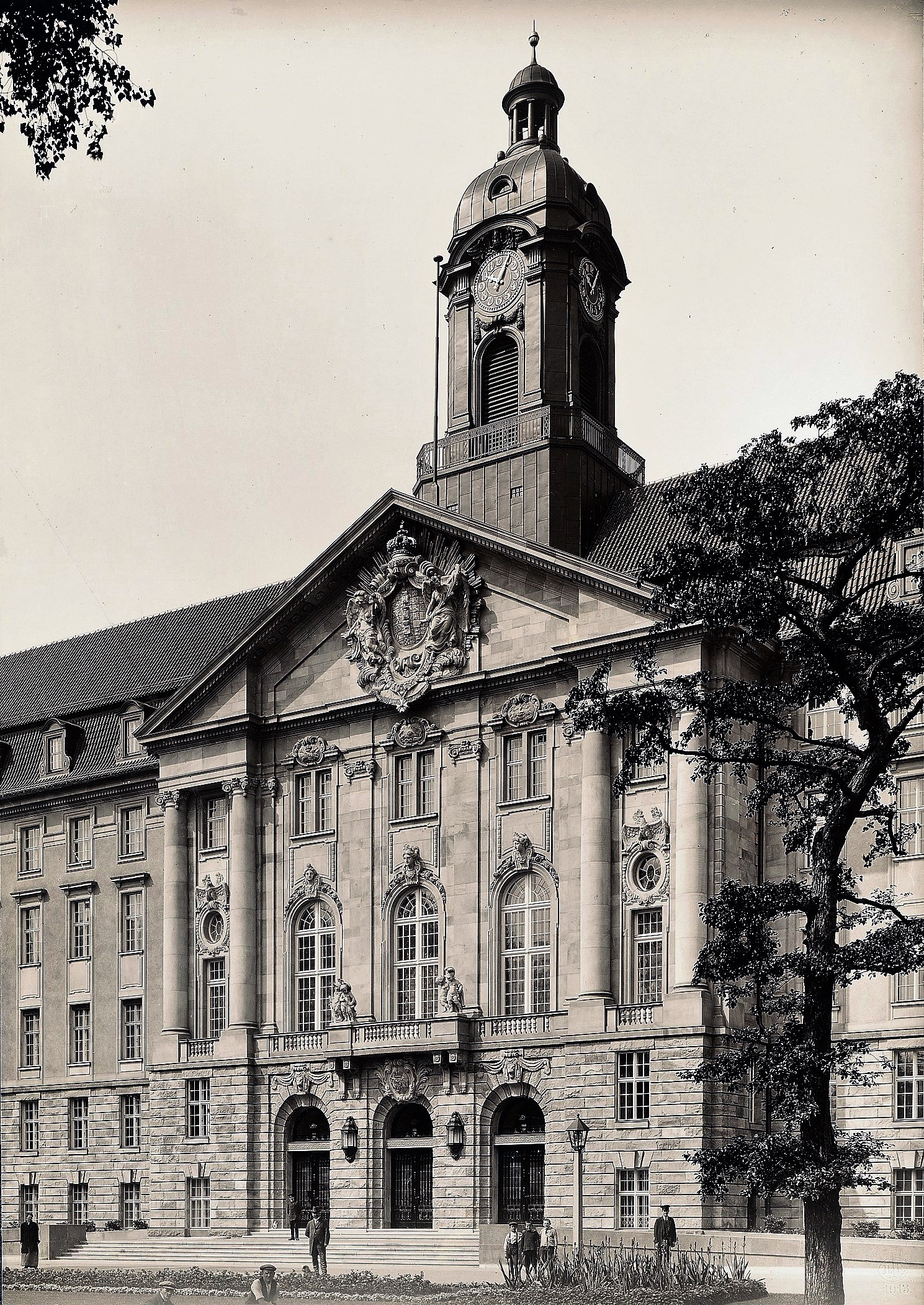 Kammergericht, Berlin. Ansicht des Mittelrisaliten der Hauptfront